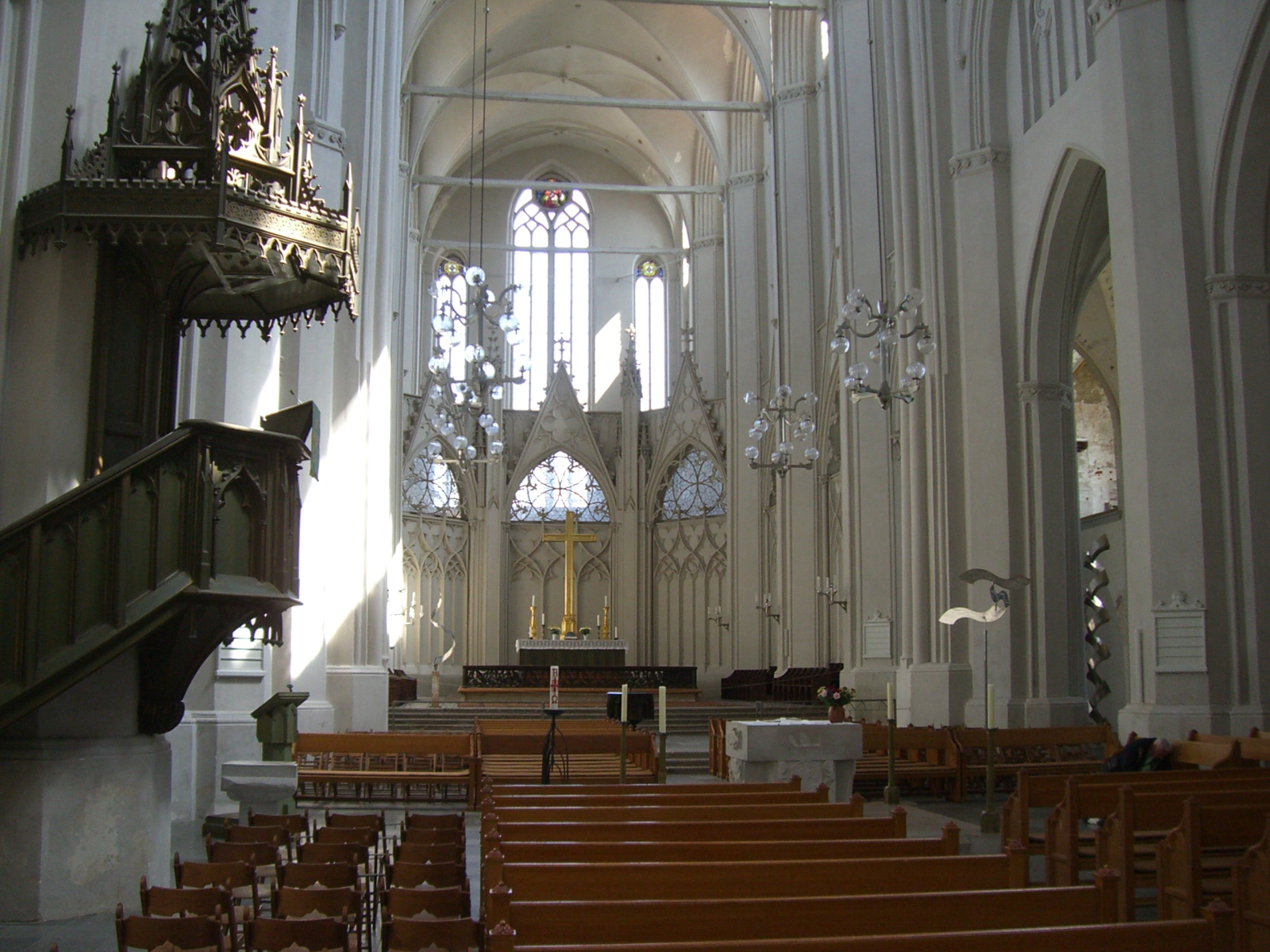 Greifswald